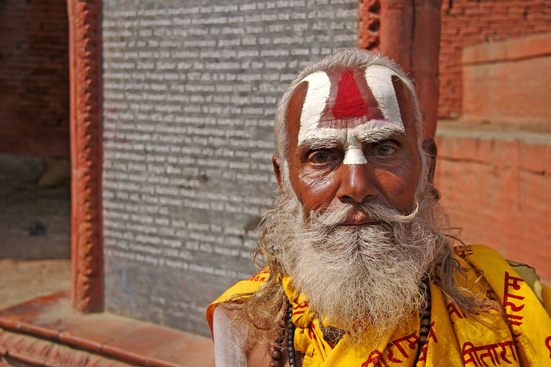 Sadhu in Kathmandu's Durbar Square